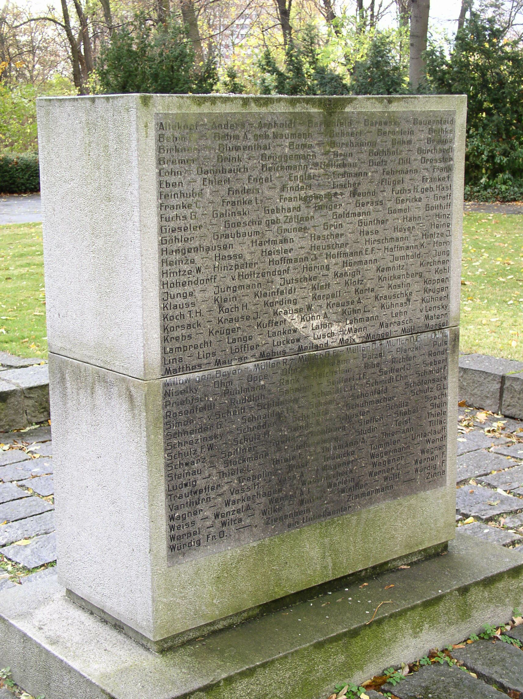 Friedhof der Märzgefallenen, Berlin-Friedrichshain, Germany